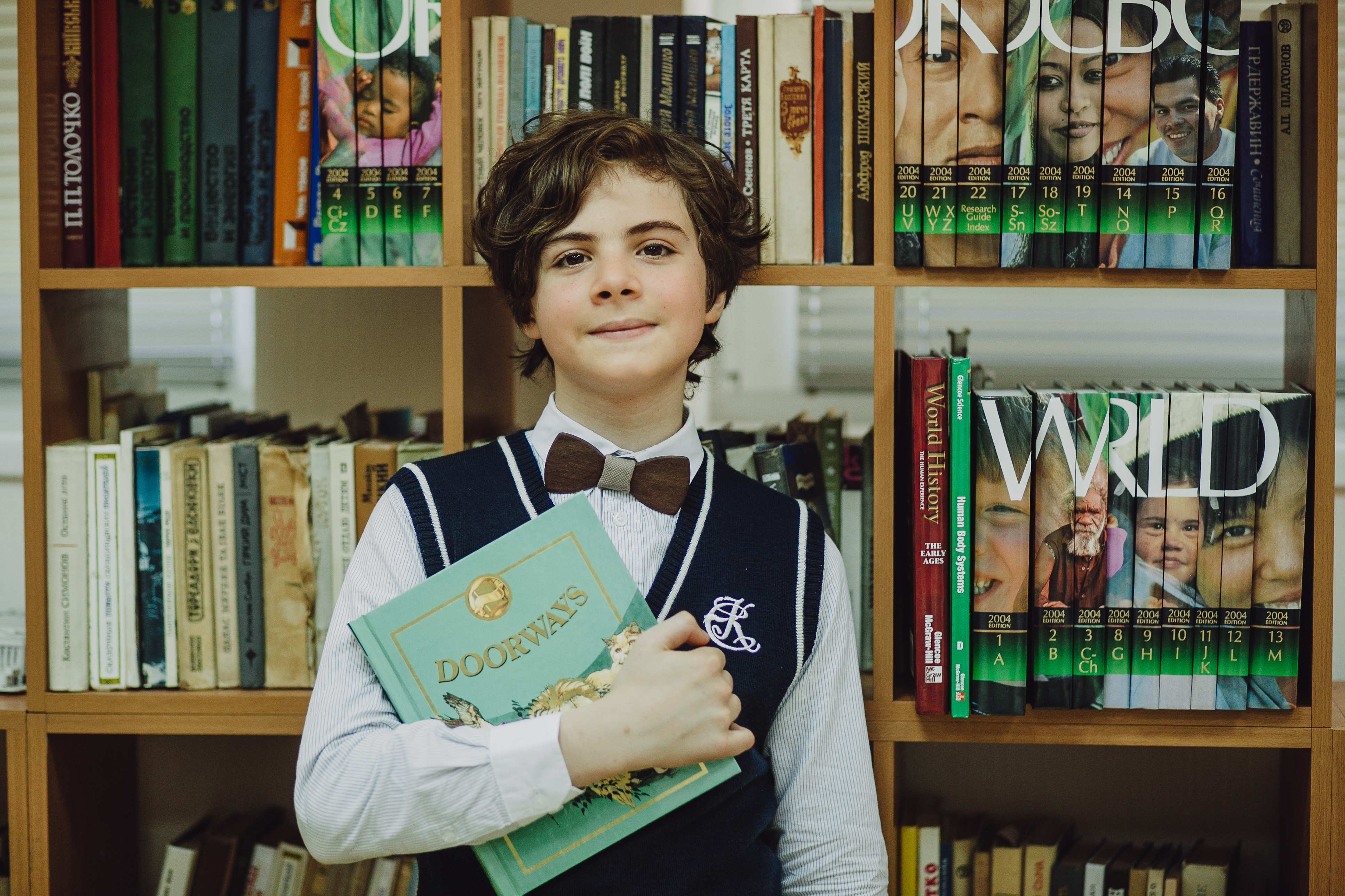 шкільна бібліотека